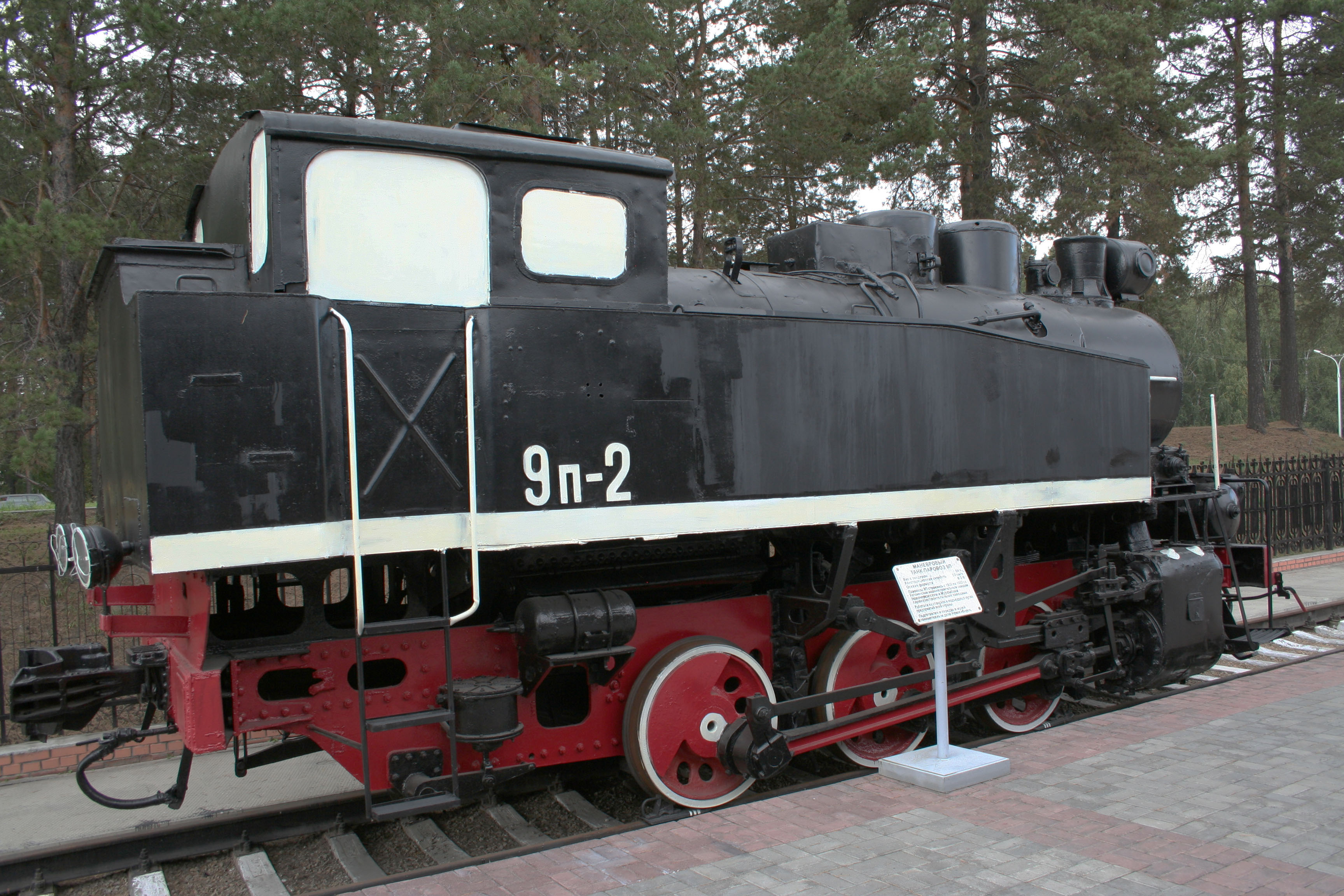 Steam locomotive 9П-2 in Novosibirsk Railway Museum / Маневровый танк-паровоз 9П № 2.